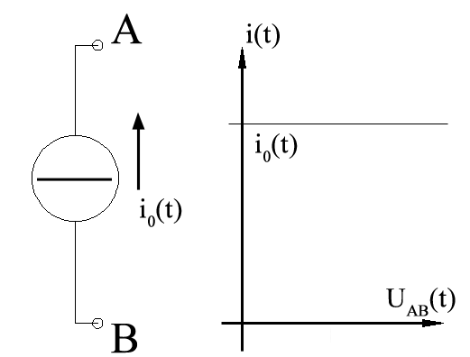 autore: Len zuò descrizione: schema generatore ideale di corrente